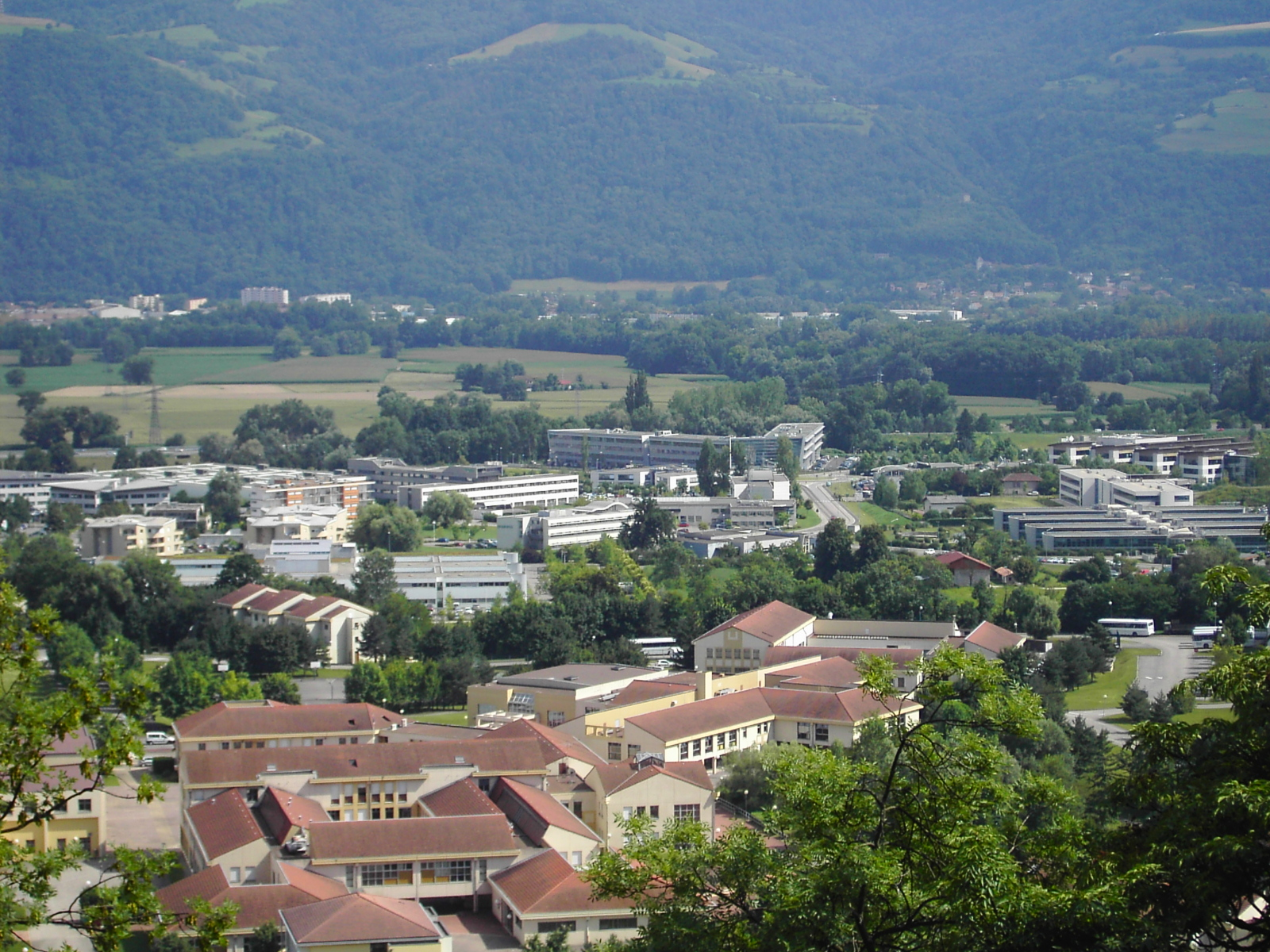 Vue générale d'inovallée depuis le parc de la mairie de Montbonnot (Isère). Au premier plan les bâtiments de l'école des pupilles de l'air.